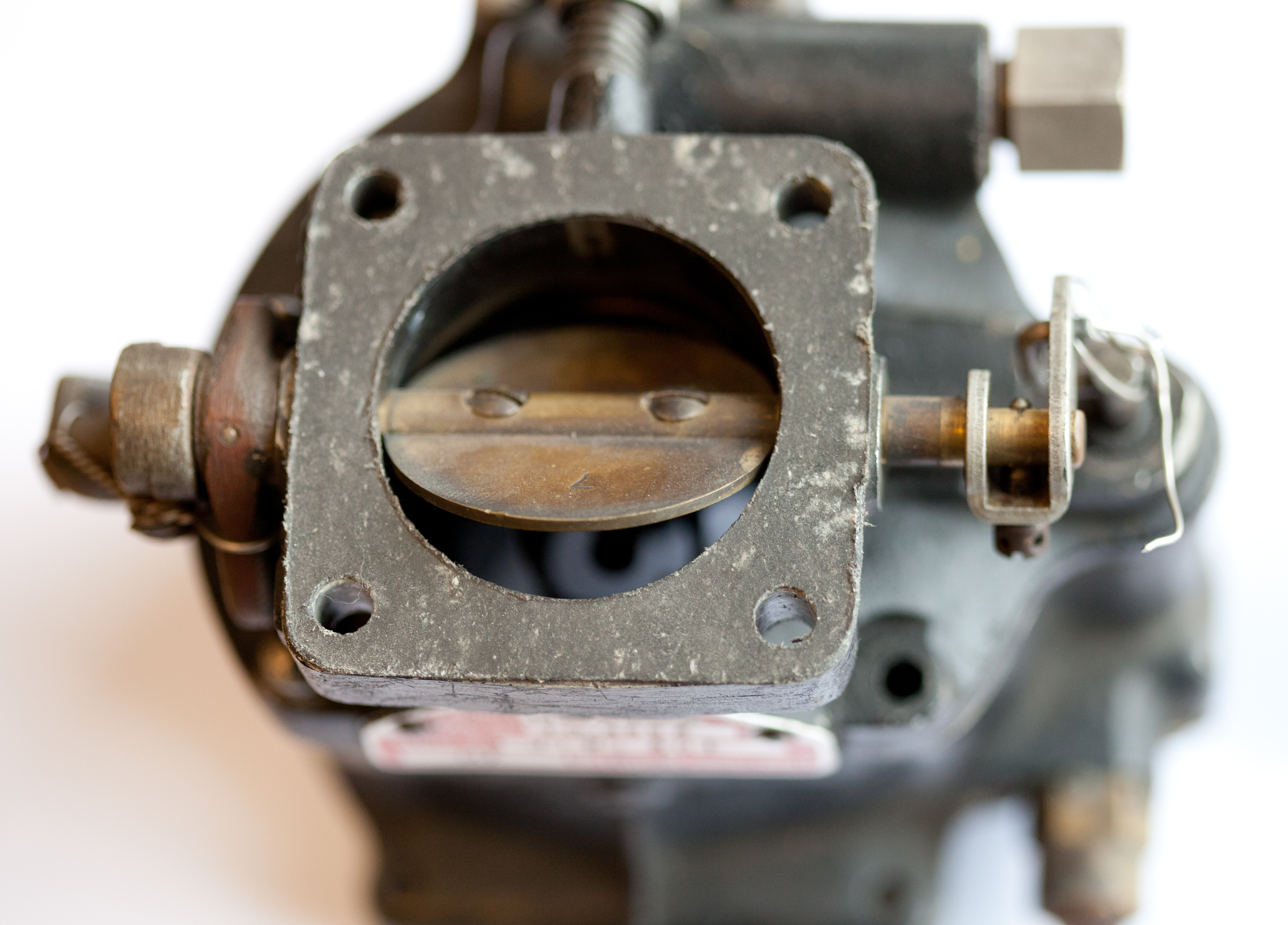 Vergaser (Kleinflugzeug)